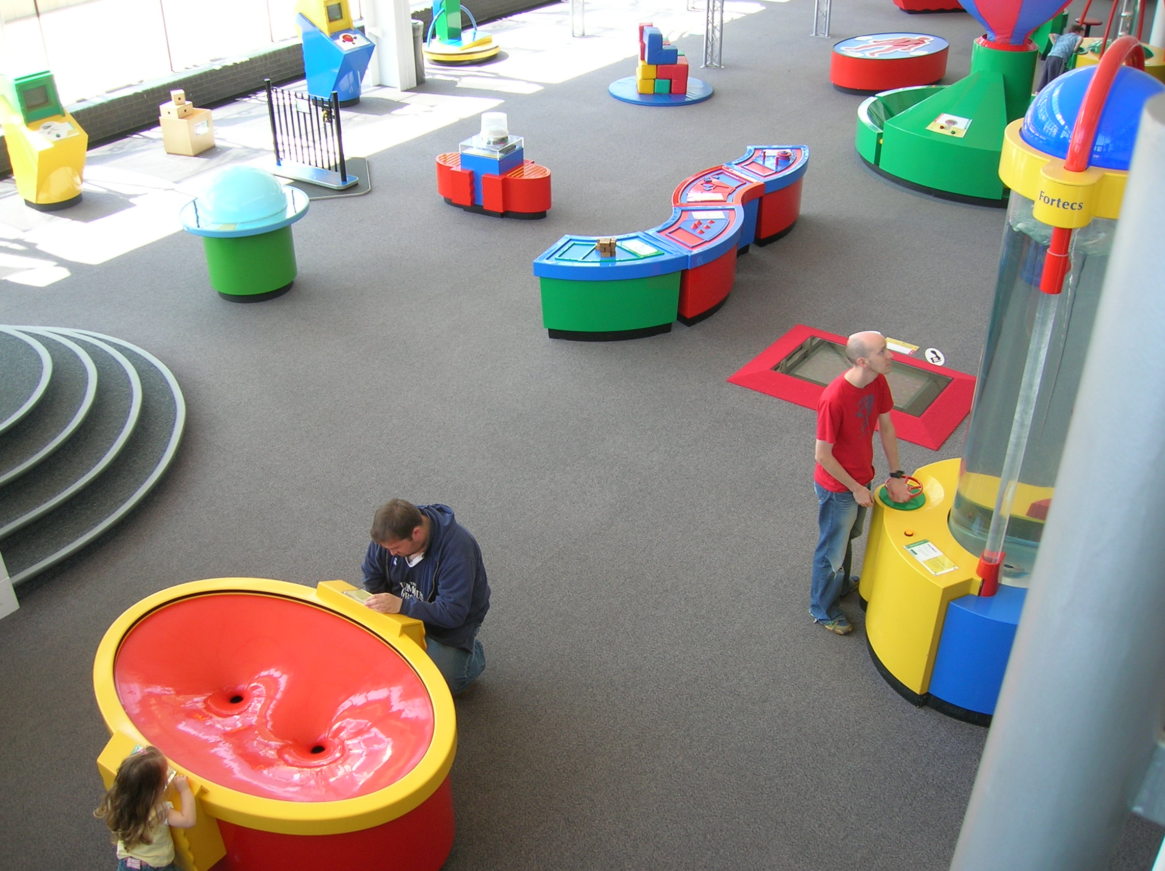 Inside Techniquest, Cardiff Bay, Cardiff, Wales